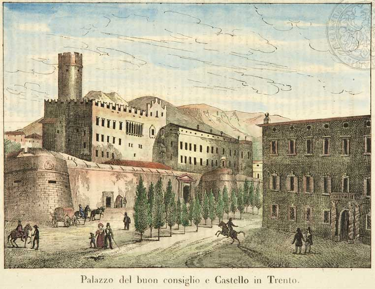 Castello del Buonconsiglio - Trento